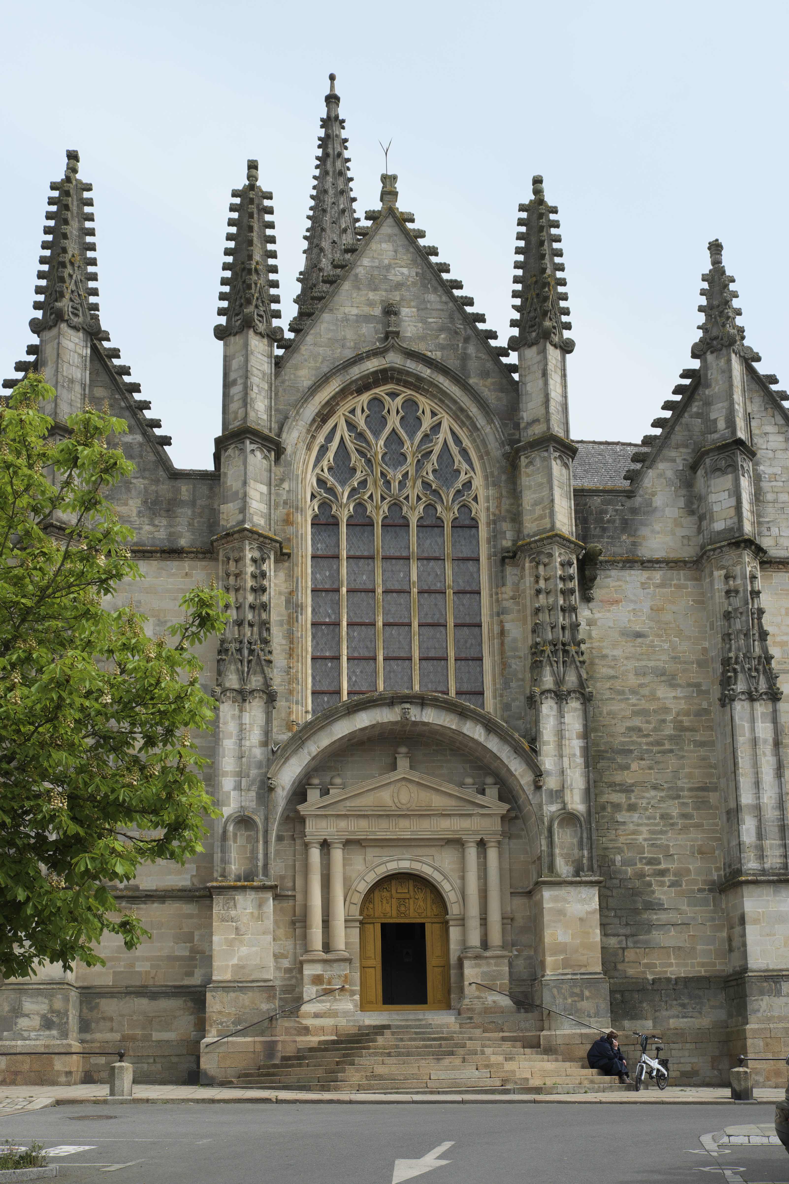 Katholische Pfarrkirche Notre-Dame in Vitré im Département Ille-et-Vilaine (Region Bretagne/Frankreich), Westfasade